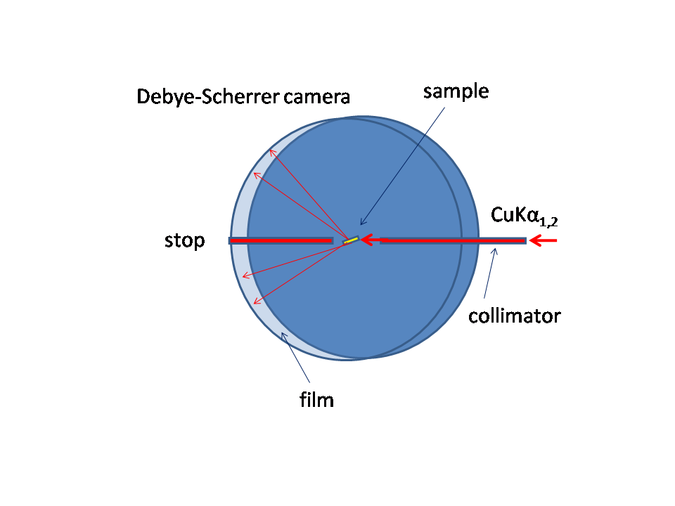 schema van een Debije-Scherrer camera